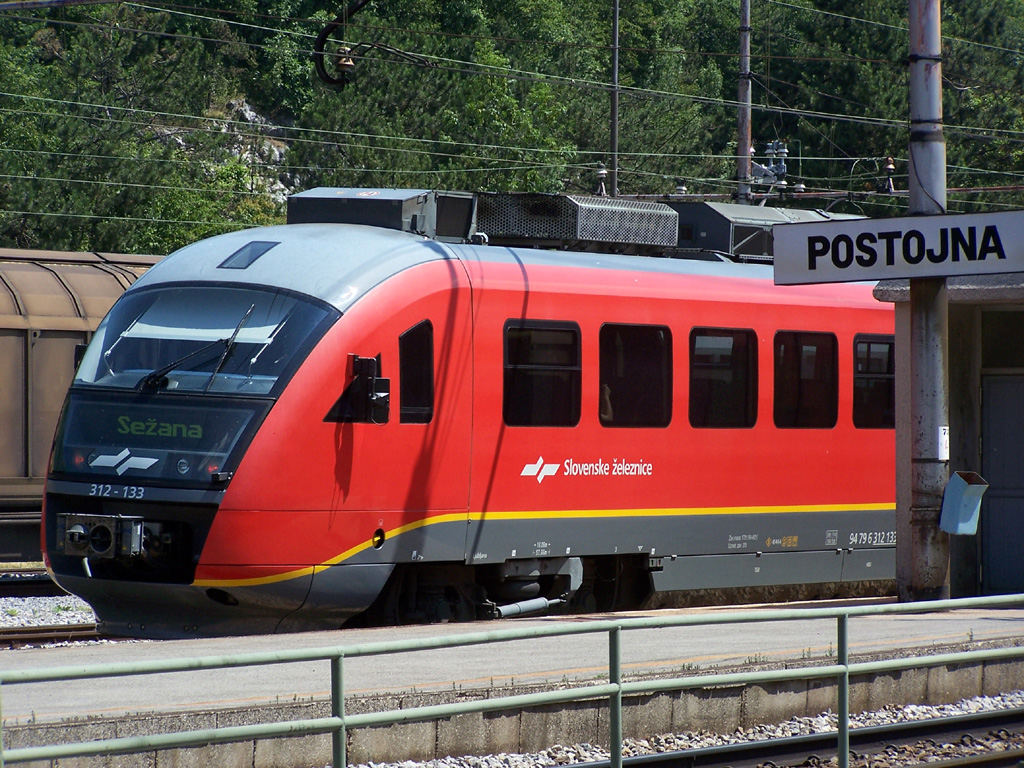 Deiro Baureihe 312 der Slowenischen Staatsbahn SZ